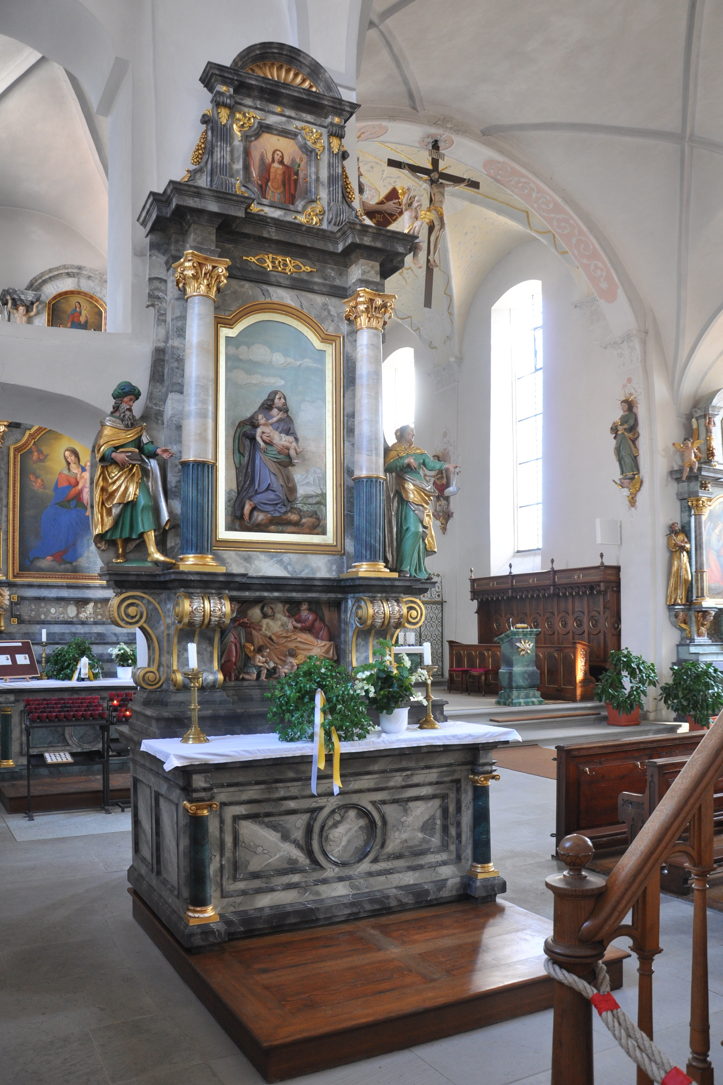 Pfärrich (Gemeinde Amtzell), Pfarr- und Wallfahrtskirche Mariä Geburt Seitenaltar links hinten von 1850, Oberbild "Erzengel Michael" von Maria Carolina Freudenreich (1886), Relief "Joseph mit Kind" (unbekannter Künstler, um 1900?), Predella-Relief "Josephs Tod" von Theodor Schnell d. Ä. (1900), Seitenfiguren hochbarock (um 1685)